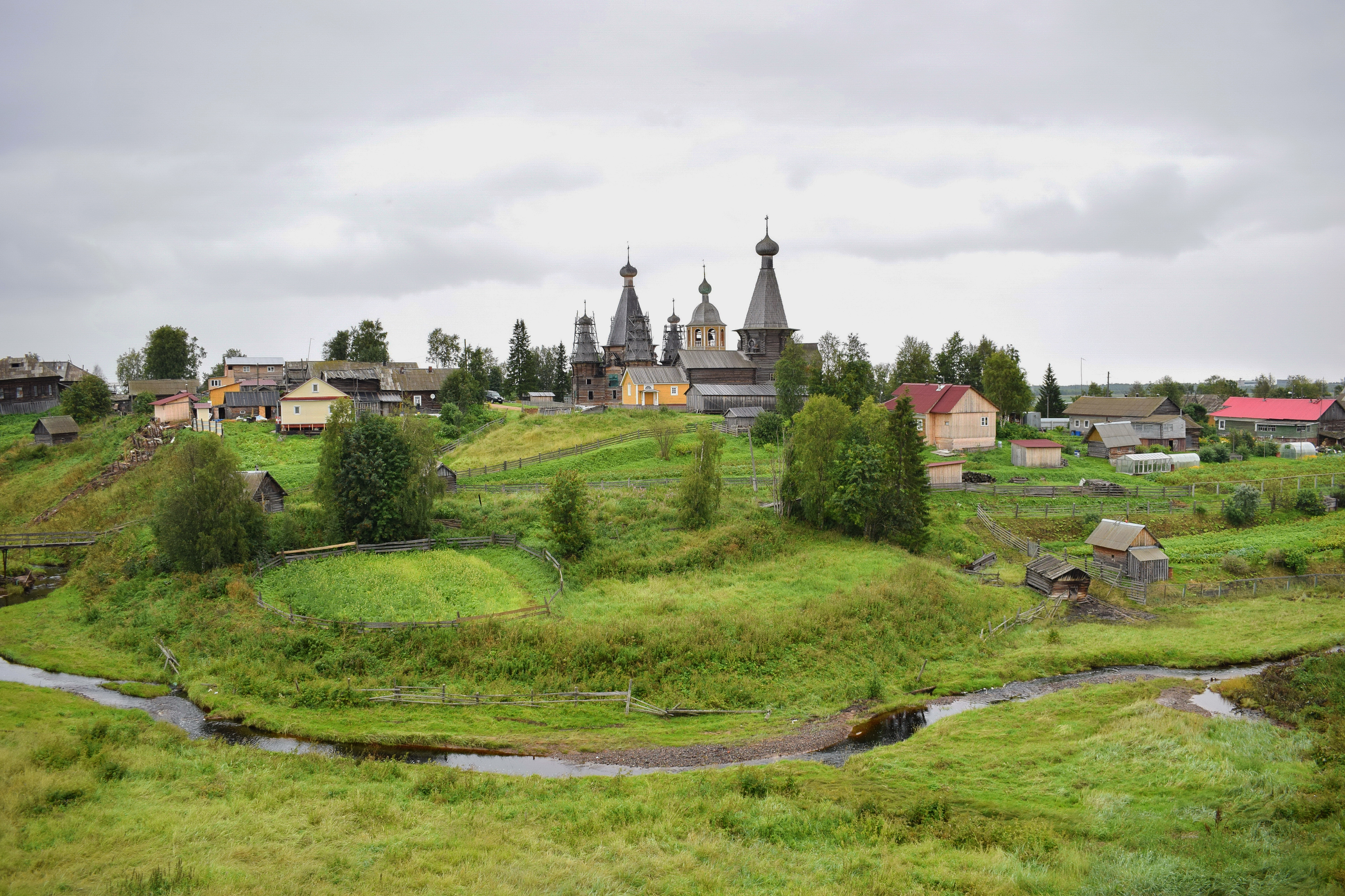 Комплекс деревянных церквей (храмовый комплекс): Нёнокса, Северодвинск, Архангельская область